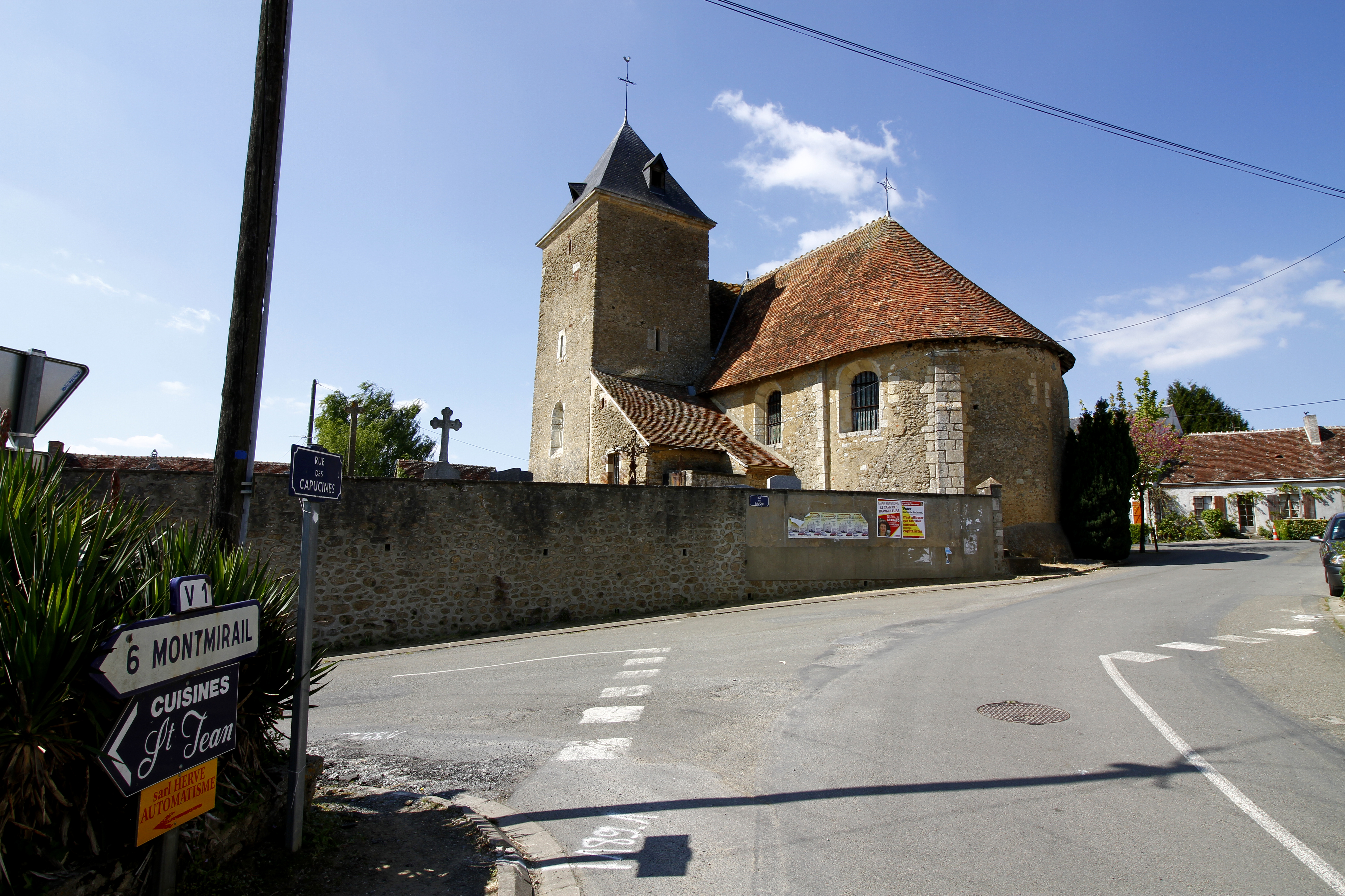 Eglise Saint Jean-Baptiste de Saint-Jean-Des-Echelles - Sarthe